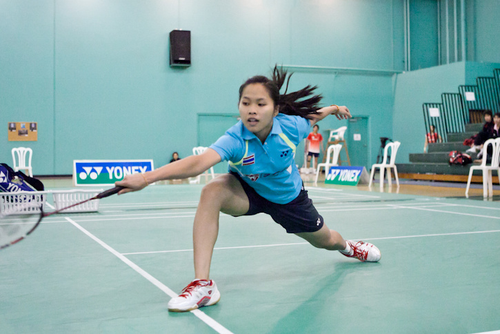 Ratchanok Intanon